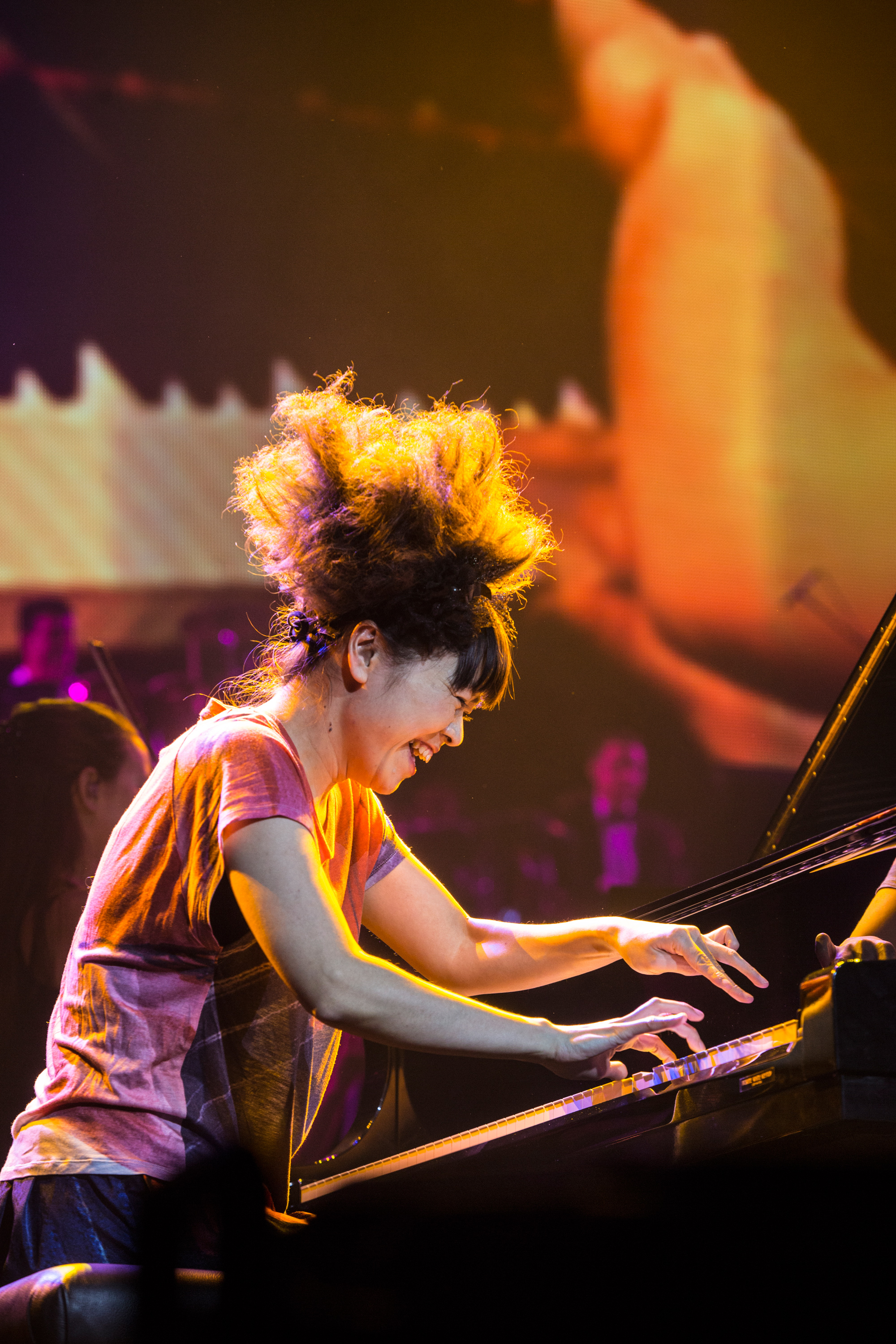 Die japanische Jazz-Pianistin Hiromi Uehara bei der AIDA Night of the Proms 2013 in der Festhalle Frankfurt.